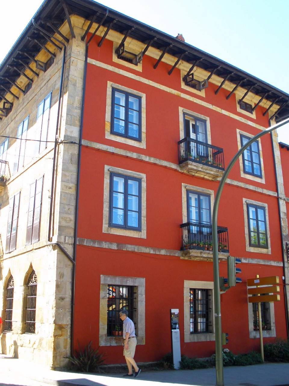 Comillas (Cantabria) - Casa Ocejo